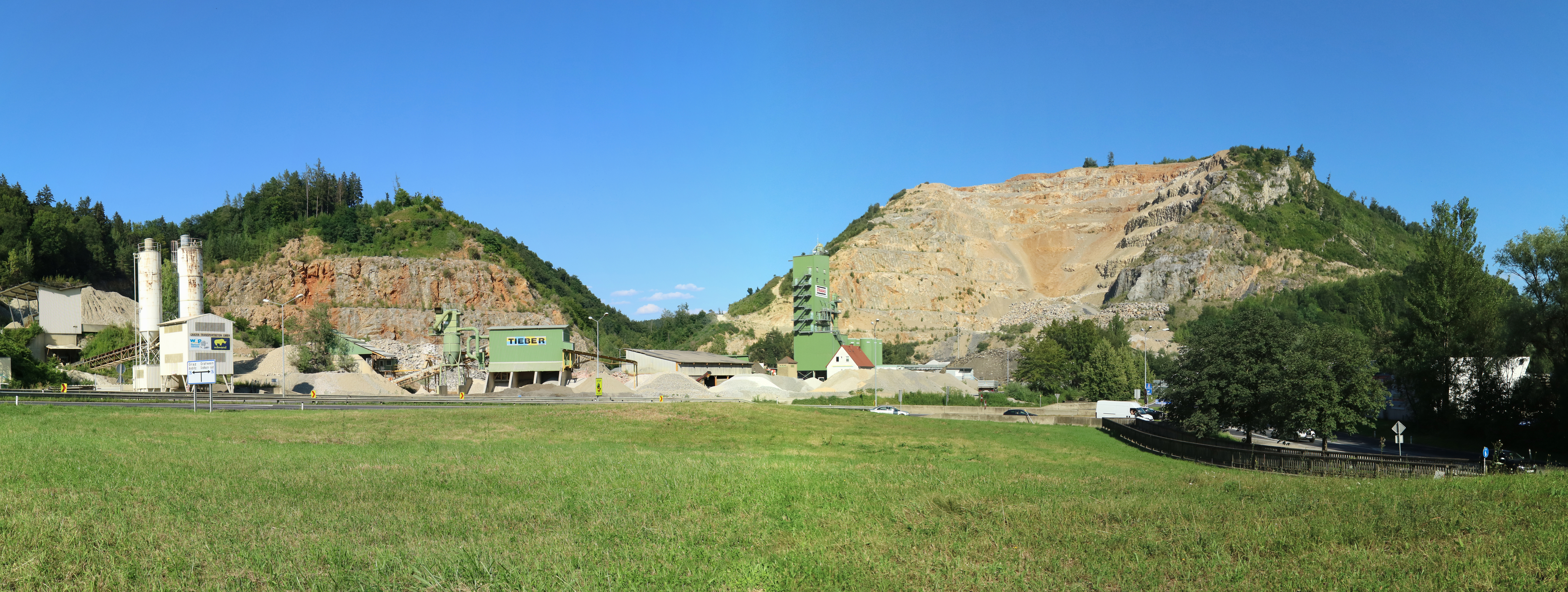 Kanzelsteinbruch Dennig am Kanzelkogel (rechts) und Pailgraben (Mitte) in der Gemeinde Gratkorn, Steiermark